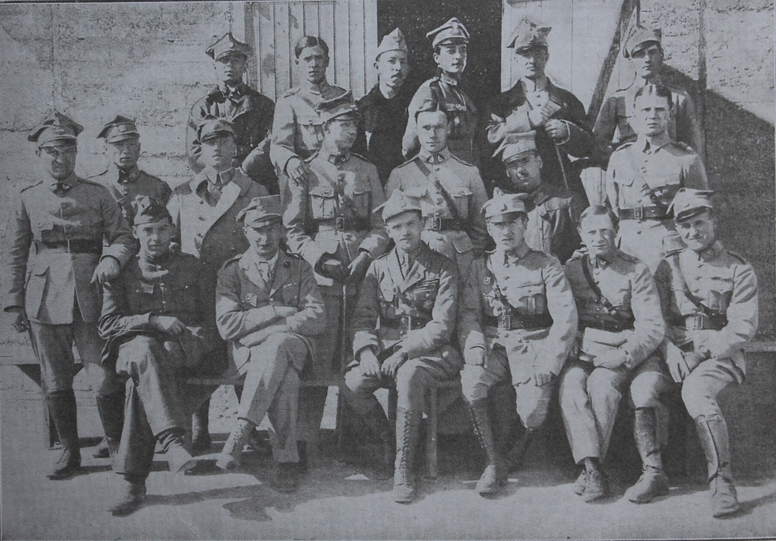 Armia Hallera - druga grupa Polaków w szkole lotniczej w Istres: mjr Narkiewicz, por. i ppor.: Walicki, Gliński, Sielicki, Truczka, Matecki, Szczerski, Zacharewicz, Giedgowd, Burchardt, Dubrawski, Kozłowski, X; maj 1919.